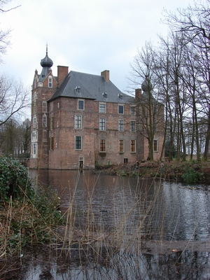 castle cannenburg Vaassen